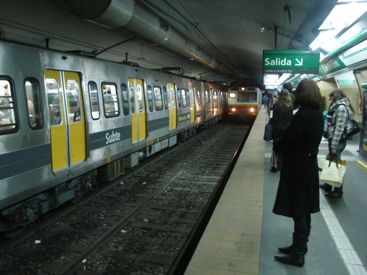 Cruce de una formación Alstom (detenida) y una FIAT Materfer en la estación Facultad de Medicina de la línea D de la red de subterráneos de Buenos Aires.